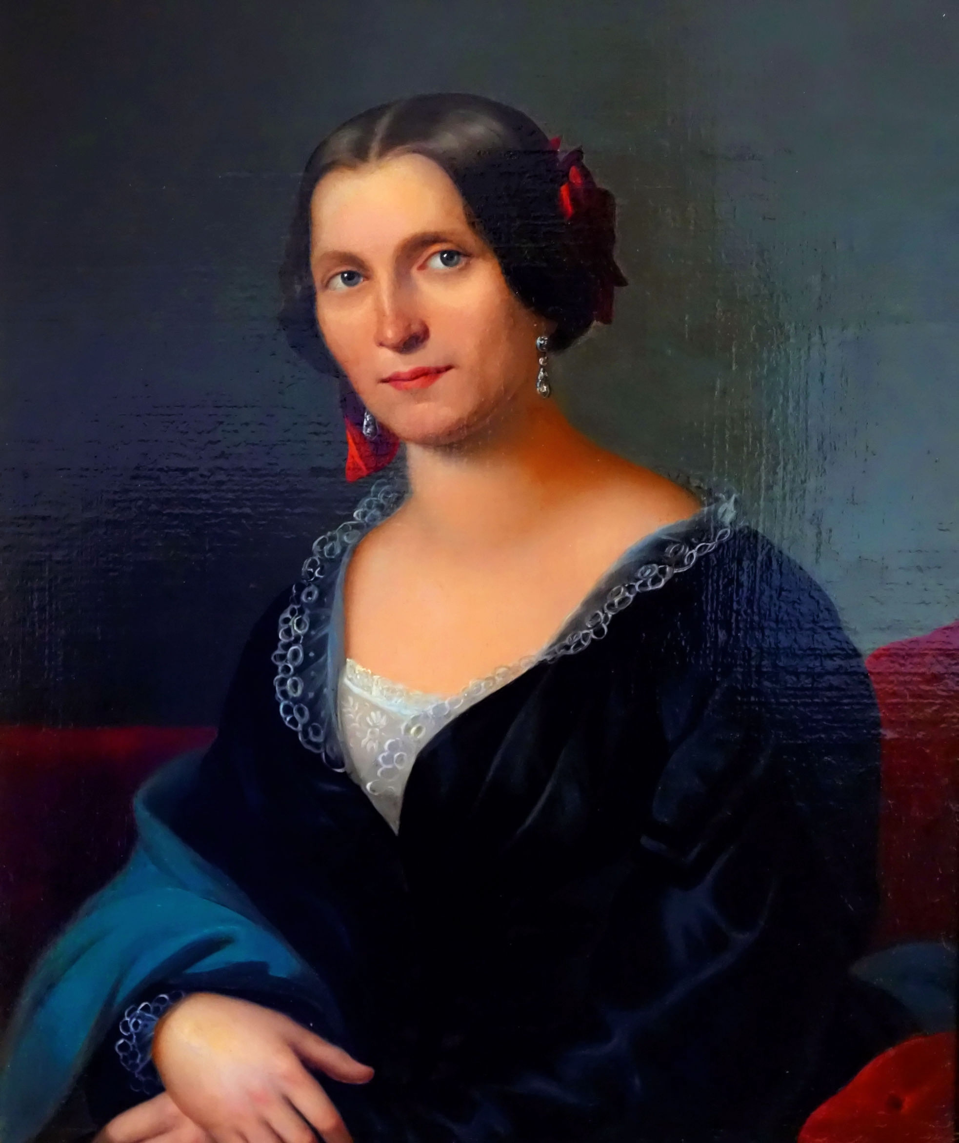 Emilie Eleonore Dorothee Westphal geb. Schultze 1807-1877